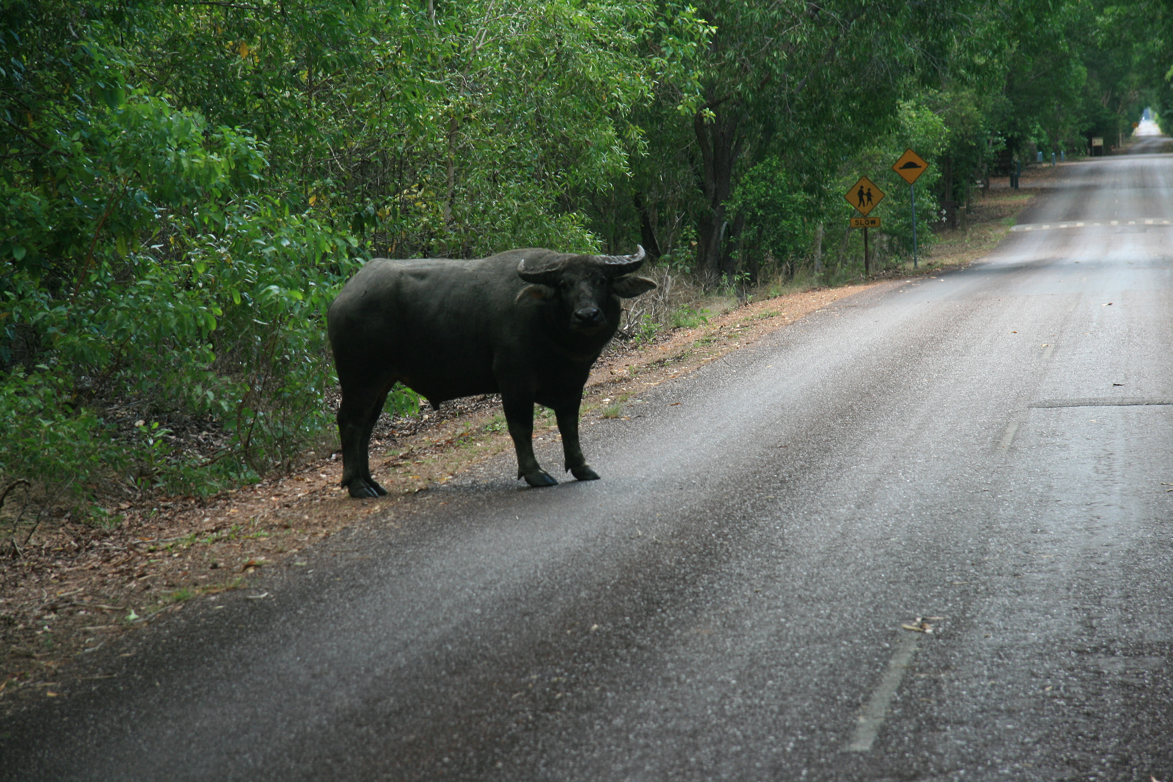 Water Buffalo at Fogg Dam.